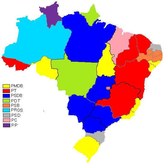 Gobernadores electos en 2010